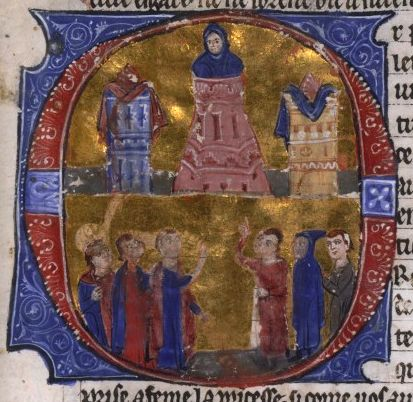 William of Tyre's Historia and Continuation, 13C manuscript from Acre. Bibliotheque Nationale Française, Richelieu Manuscrits Français 2628 Copyright-free, from Bibliotheque Nationale Française site Gallica (